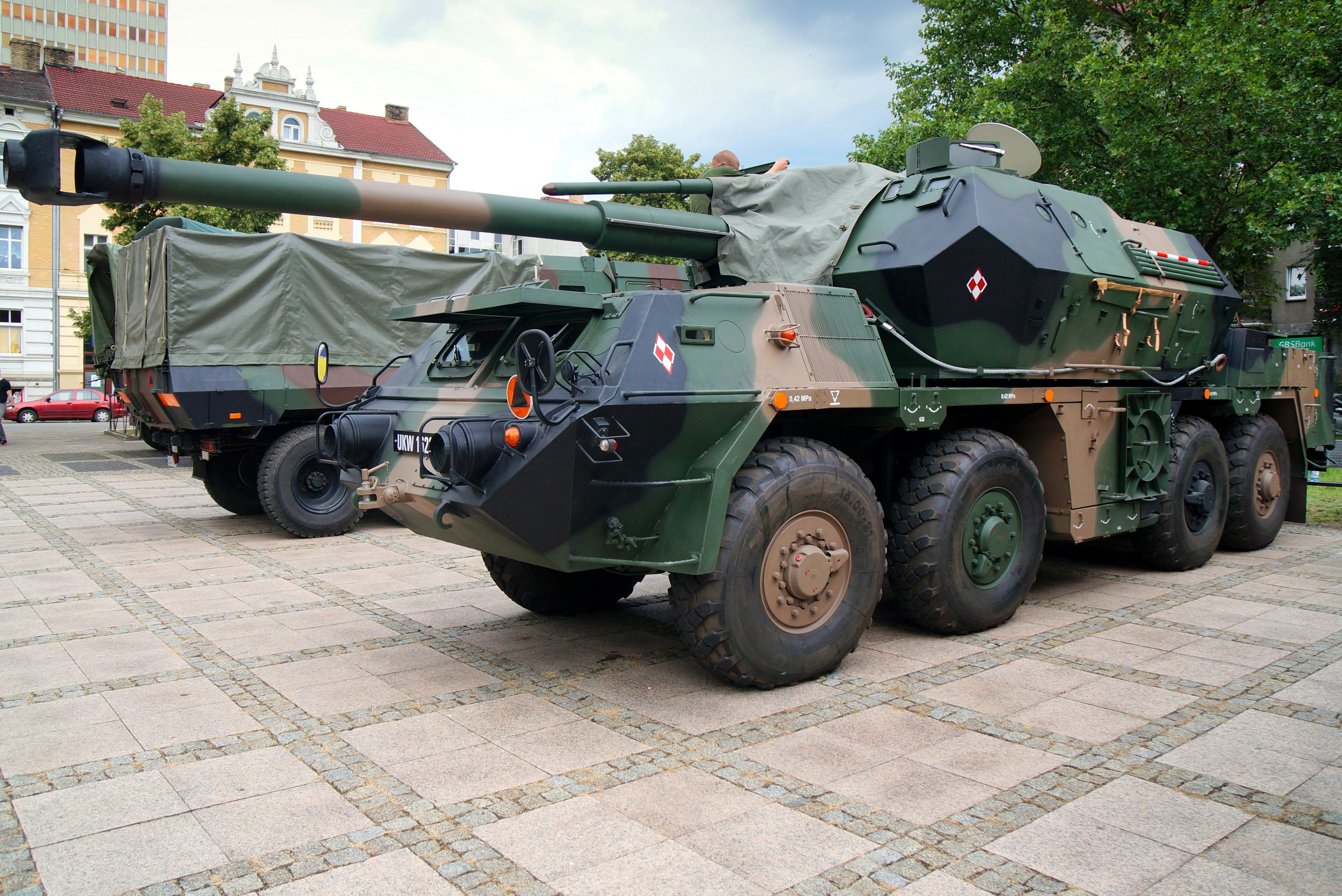 Armatohaubica wz.77 Dana jest zbudowane na podwoziu ciągnika kołowego Tatra T-815 VT Kolos. Prezentacja podczas "Dni NATO" w Gorzowie Wlkp.